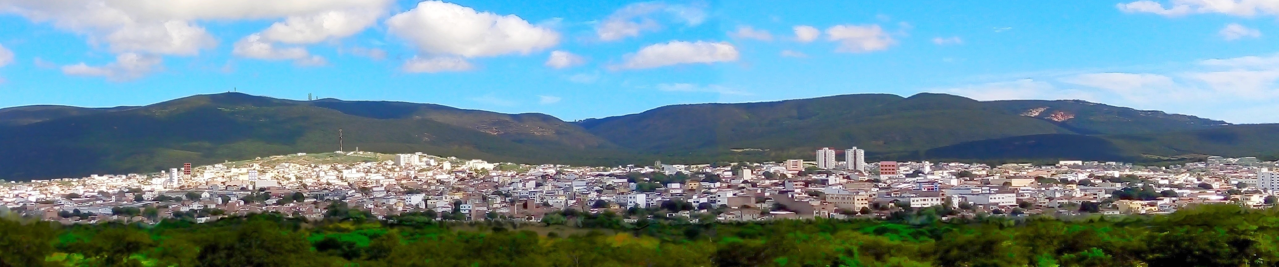 imagem de Brumado.